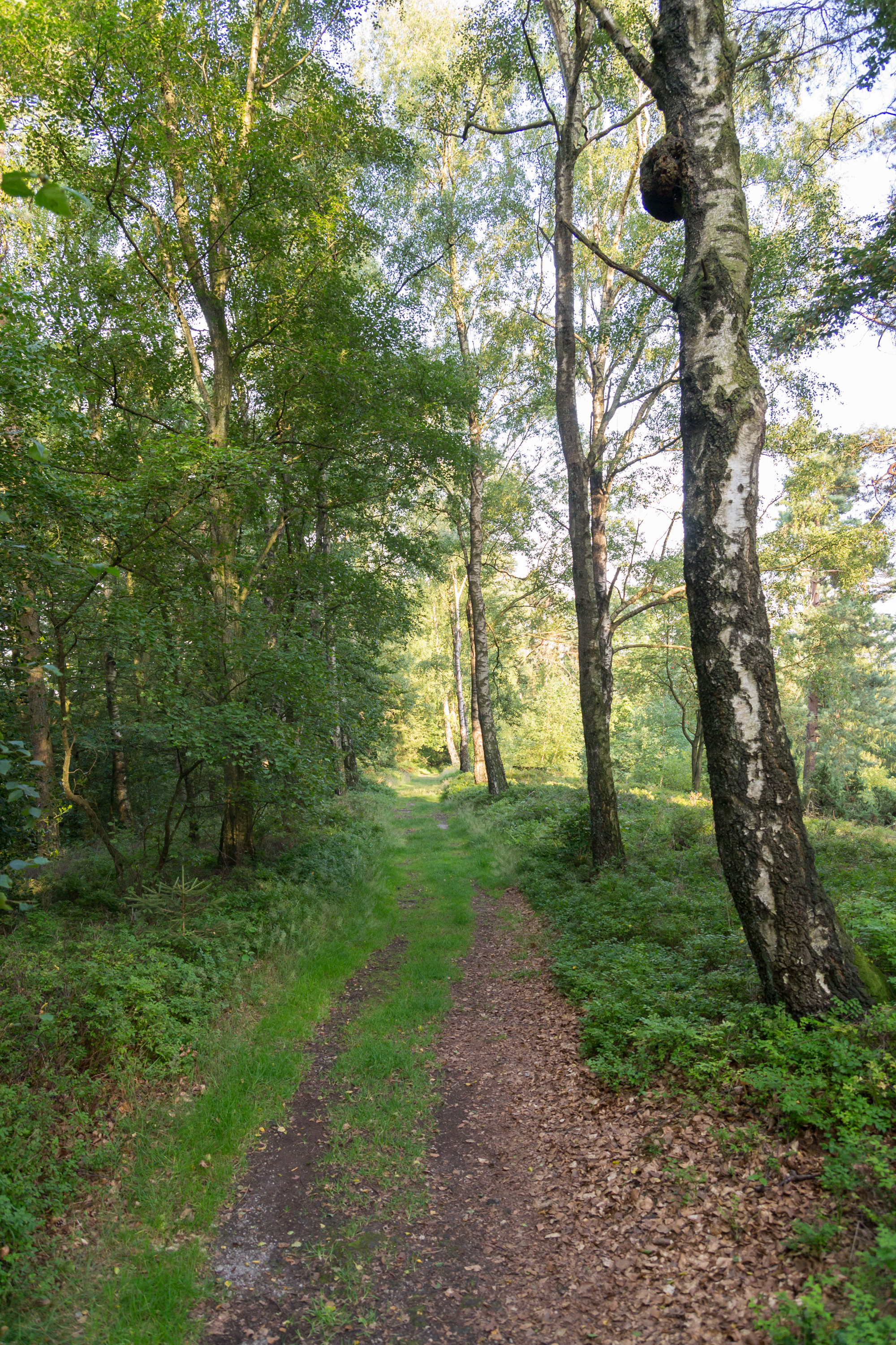 Naturschutzgebiet Externsteine, Hermannsweg